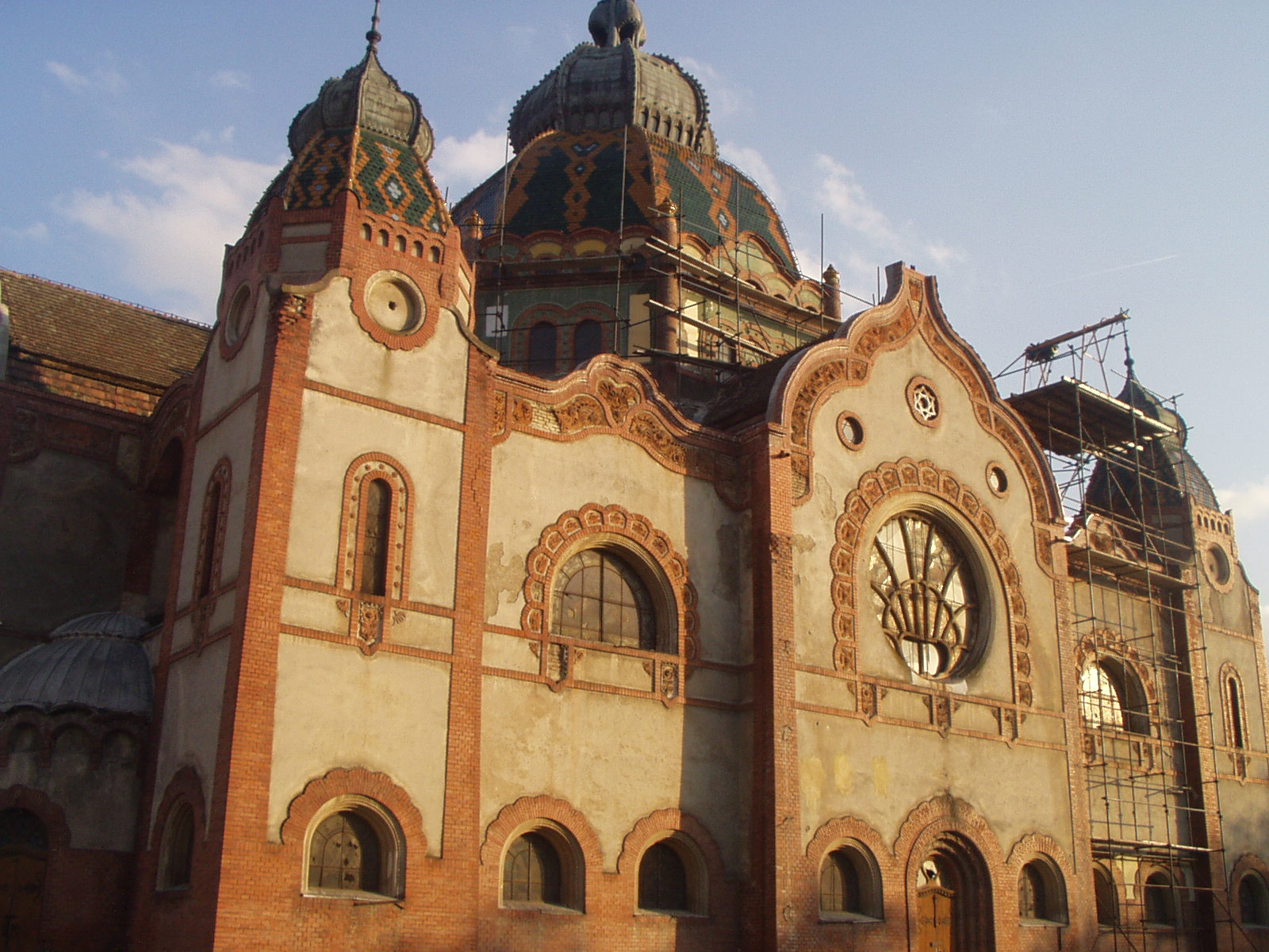 Јеврејска синагога у Суботици